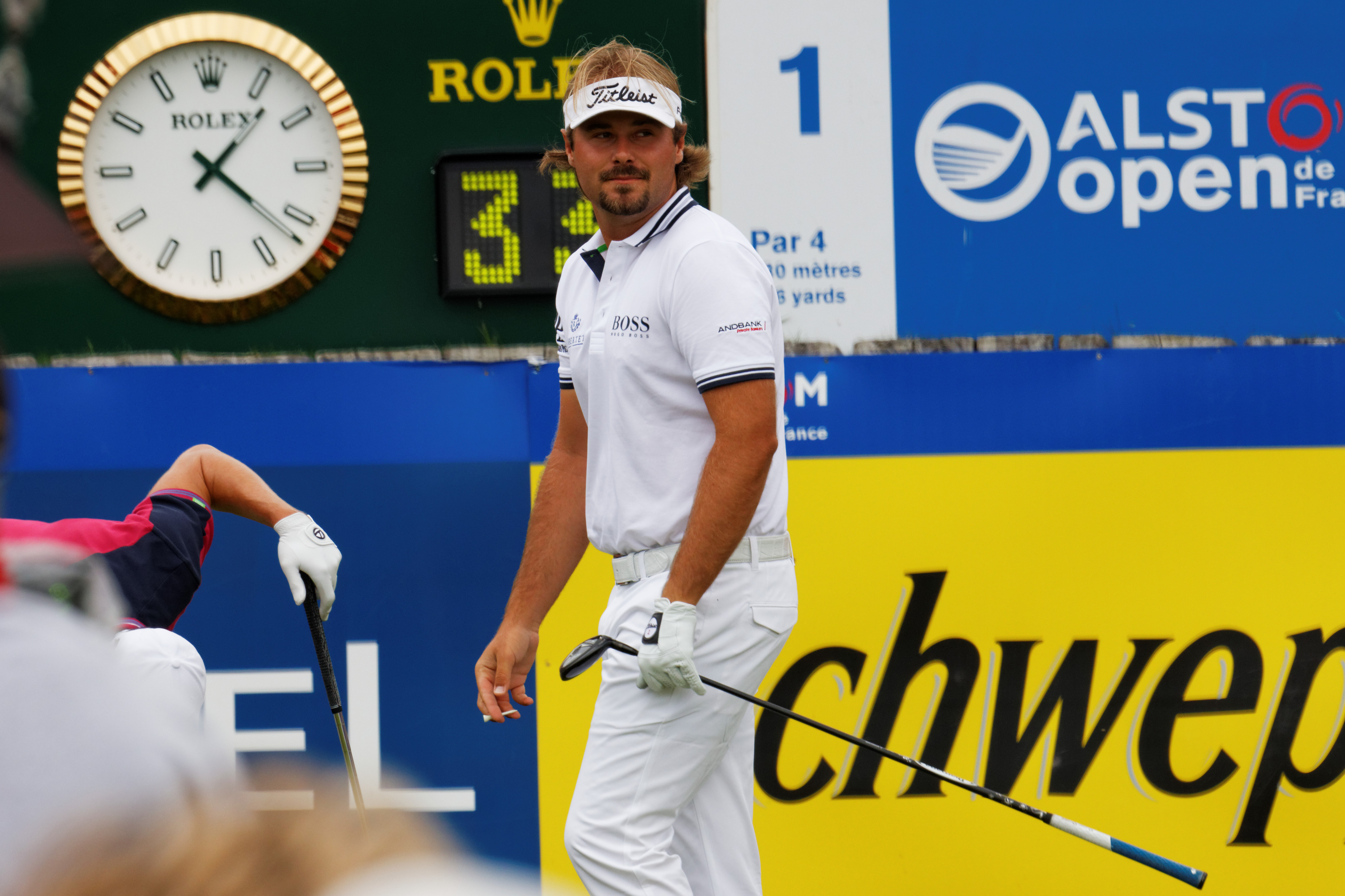 Image prise lors de l'Alstom - Open de France 2015 - départ du tee n°1 - 4ème tour